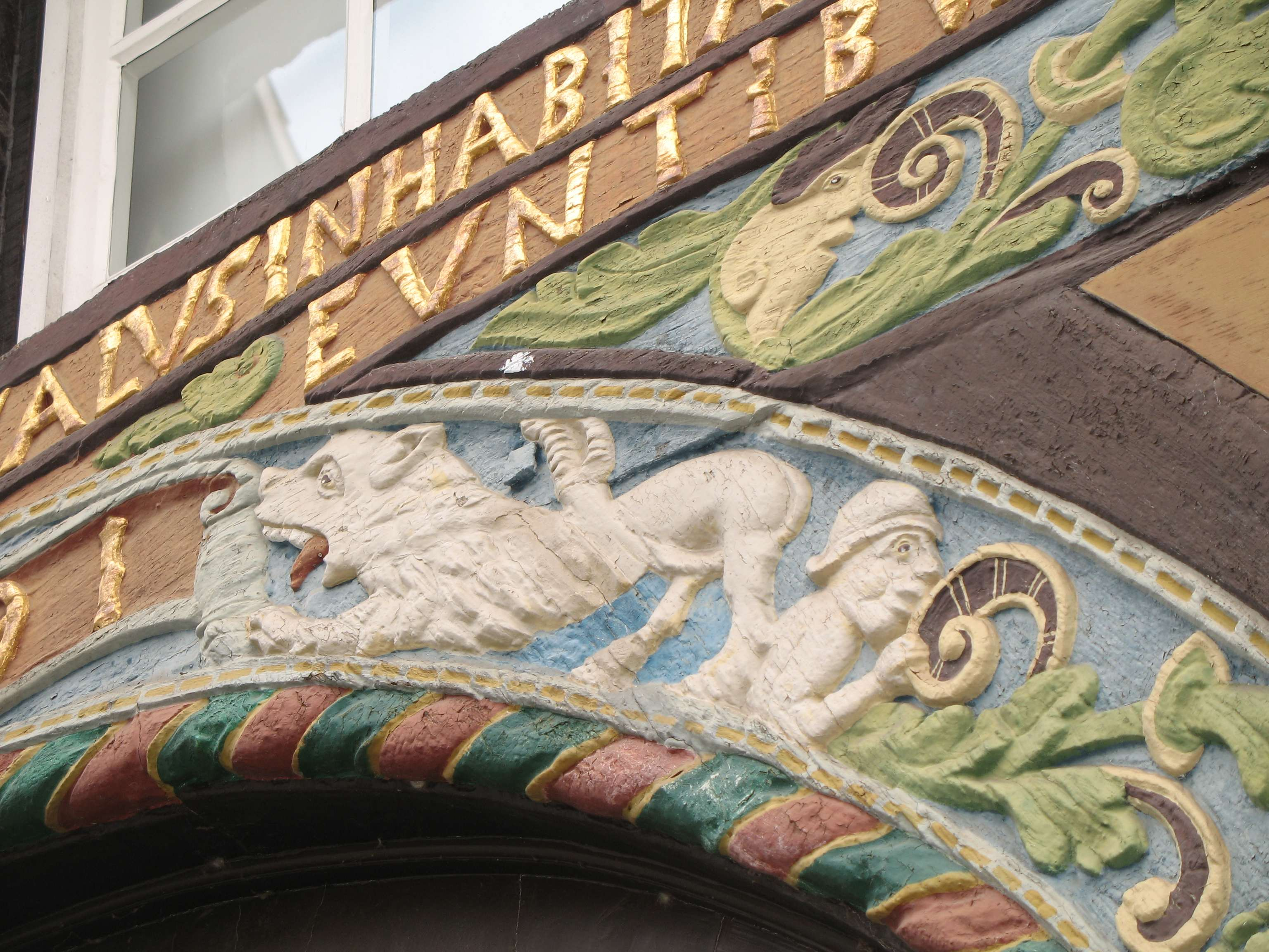 Wiedenbrück, früher Heimatmuseum, heute Kunstgalerie, Schnitzerei am Torbogen